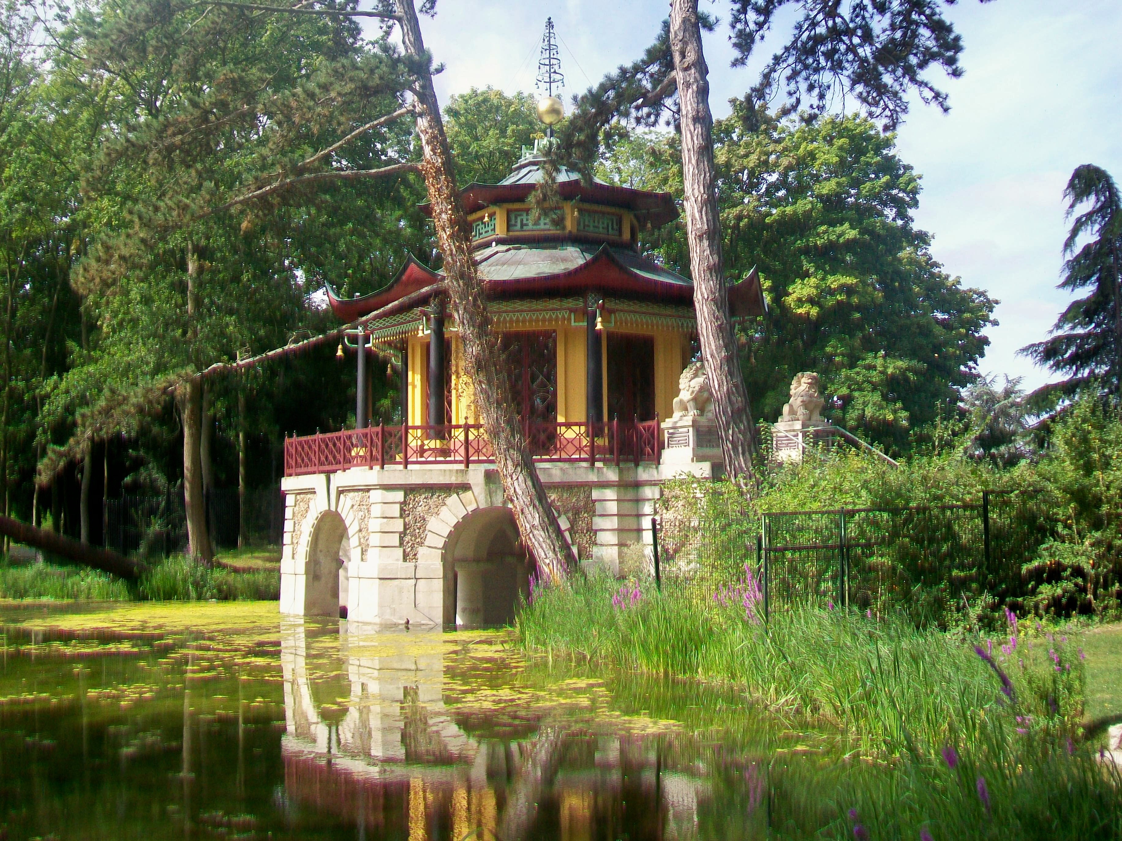 Vue du pavillon depuis le nord-est.